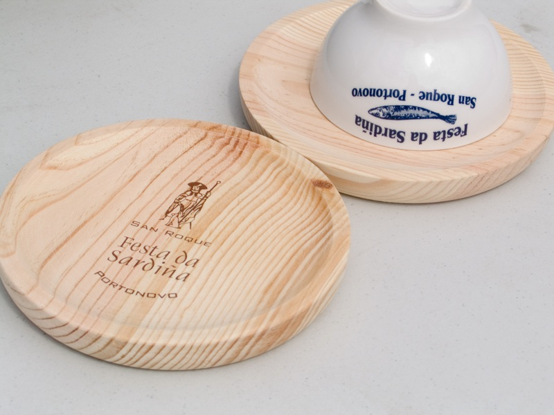 Festa da Sardiña, Portonovo, Adina, Sanxenxo, Pontevedra, Galiza